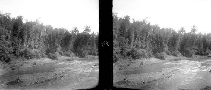 Negatief. Typisch Oost-Javaanse bamboe langs de oever van de rivier Brantas, stroomopwaarts gezien vanaf de brug bij Sentoeroeh, Malang, Java